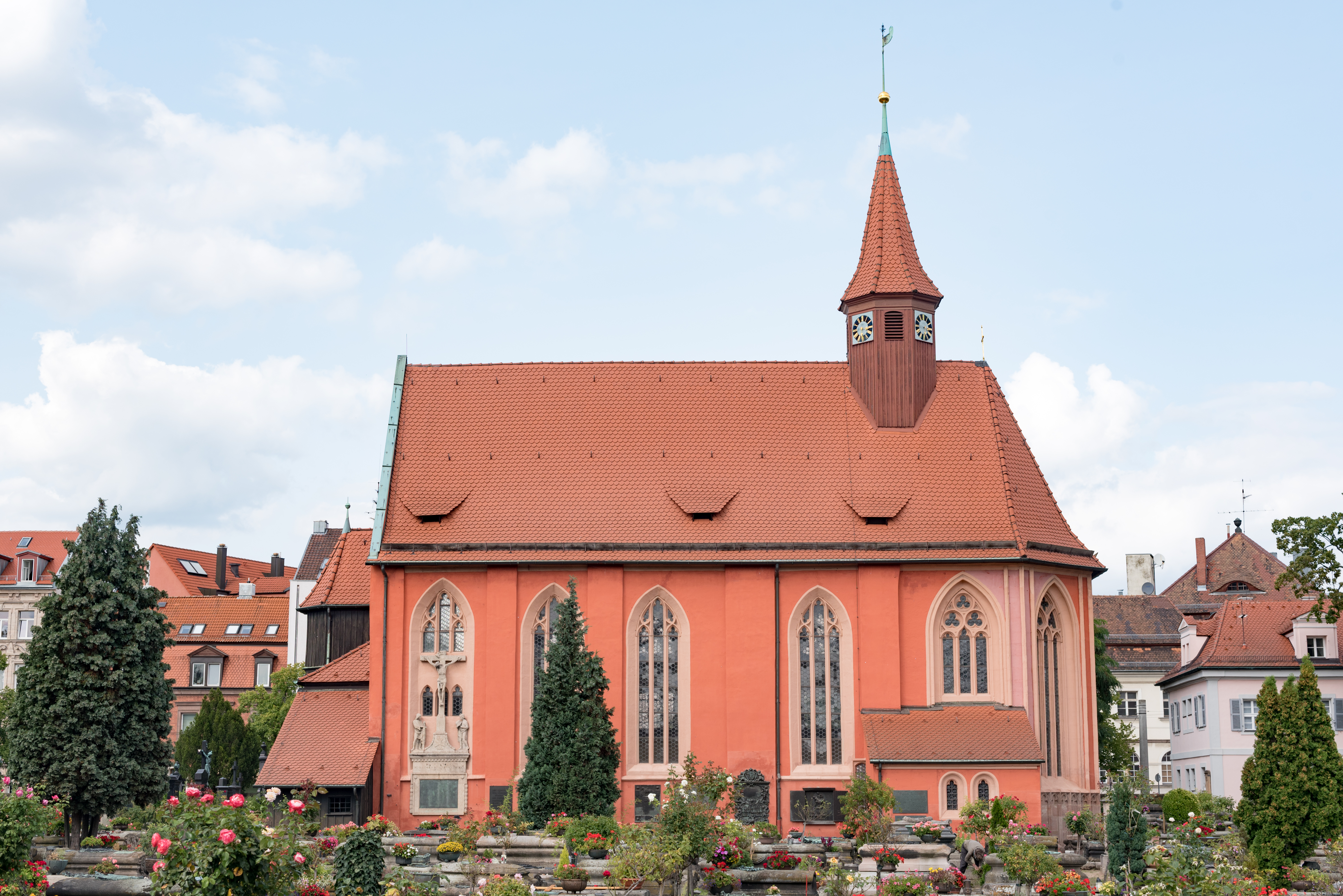 Nürnberg, Johannisstraße 57, Friedhofskirche St. Johannis